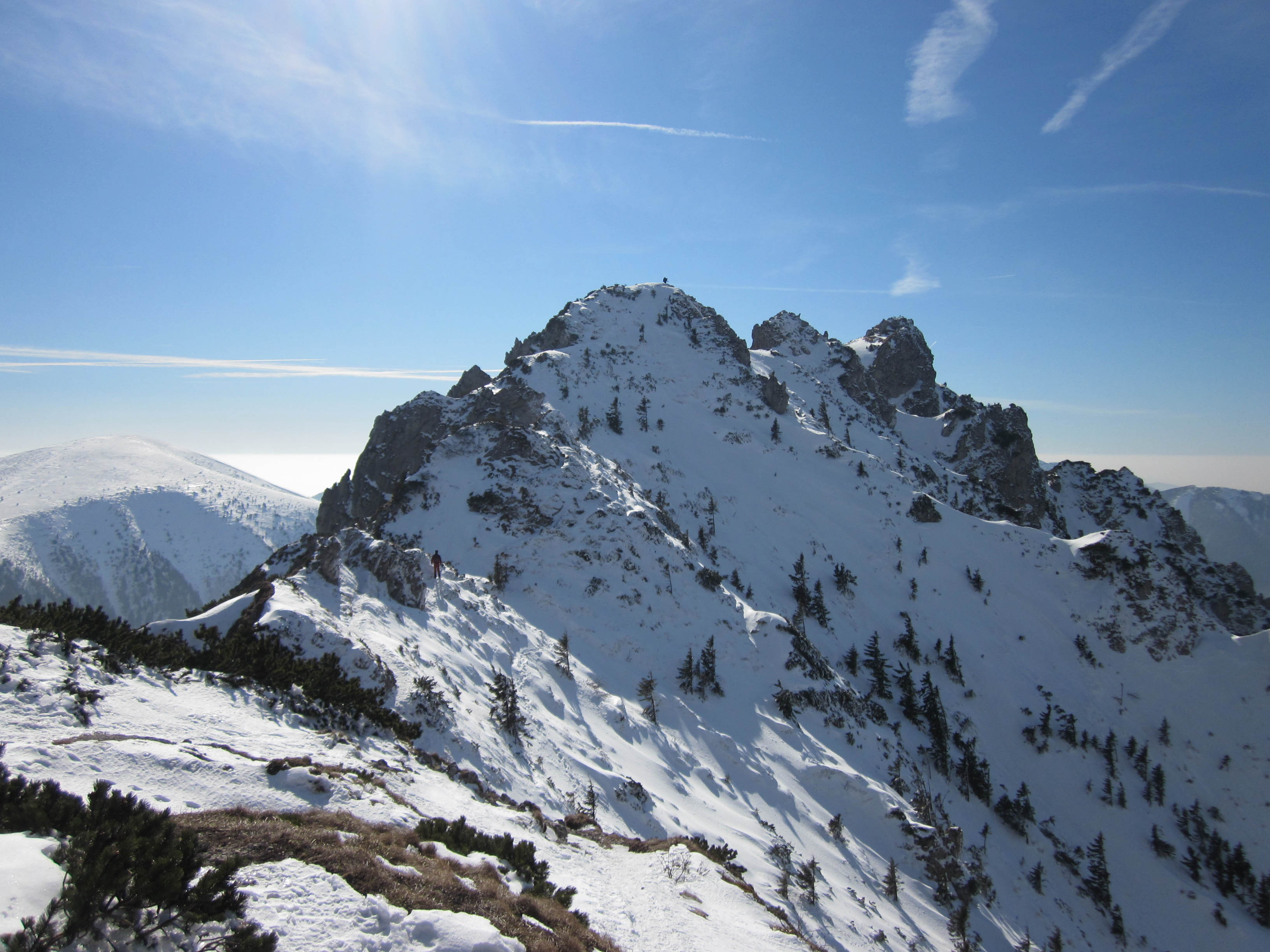 Vrchol Veľkého Rozsutca v zime